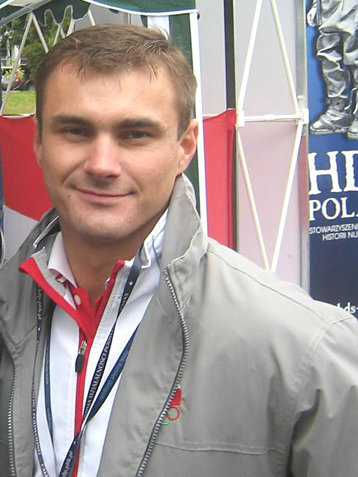 Leszek Blanik, gimnastyk sportowy.